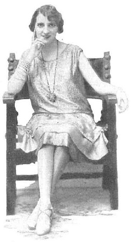 Fotografía de la actriz española Antonia Herrero publicada en 1926 con motivo de su actuación en la comedia teatral El veneno del tango.